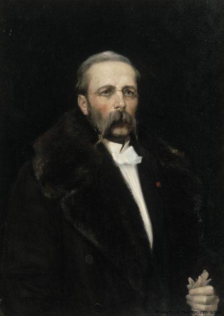 Carl Albert Edelfelt. Porträtt av sonen Albert Edelfelt 1883.